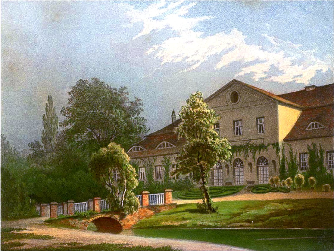 Schloss Gusow, Kreis Lebus, Provinz Brandenburg